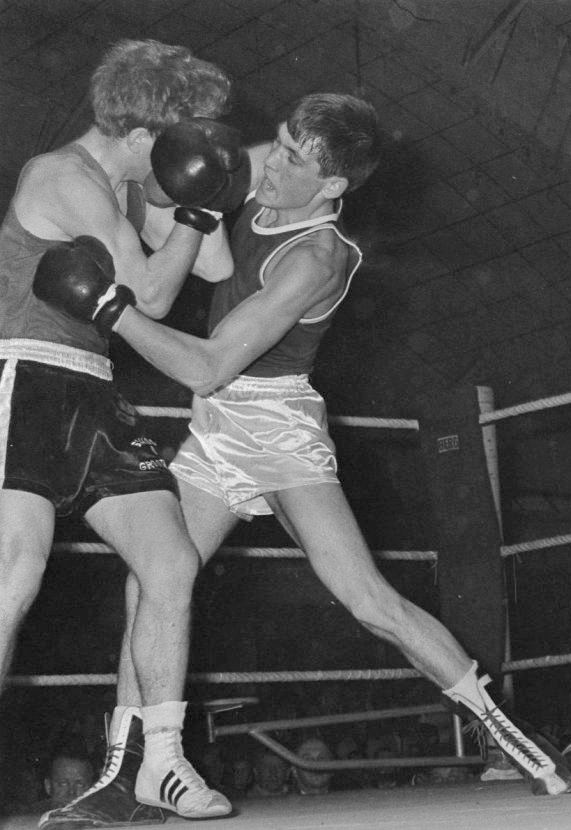 Internationaal Bokstoernooi in RAI. Huppen (links) (Ned.) en de Russische bokser Sokolov in aktie